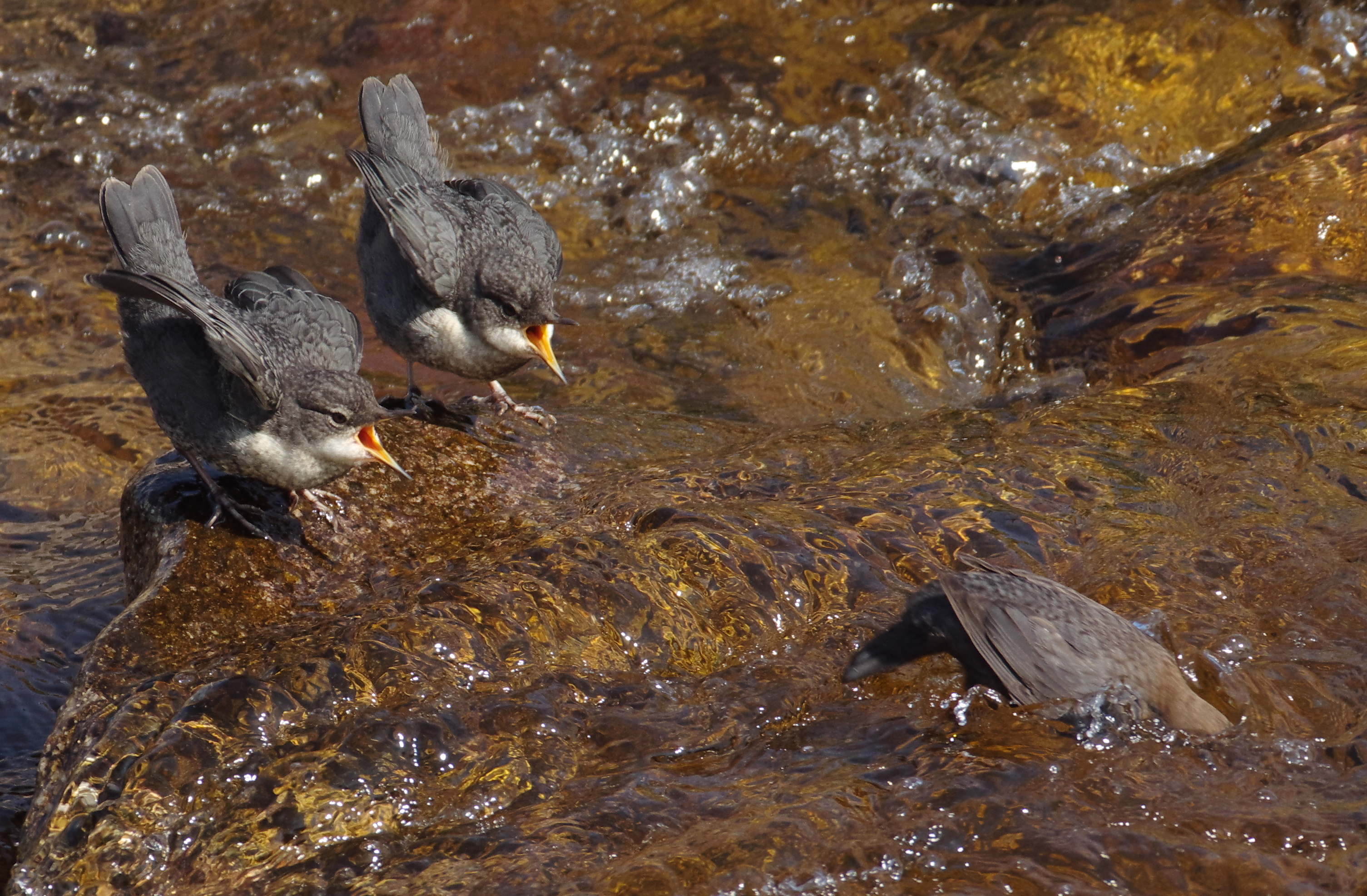 Eine Wasseramsel taucht nach dem Füttern der bettelnden Jungtiere ab. Aufgenommen an der Murg in der Stadtmitte von Gernsbach, FFH-Gebiet Unteres Murgtal und Seitentäler, Naturpark Schwarzwald Mitte/Nord.